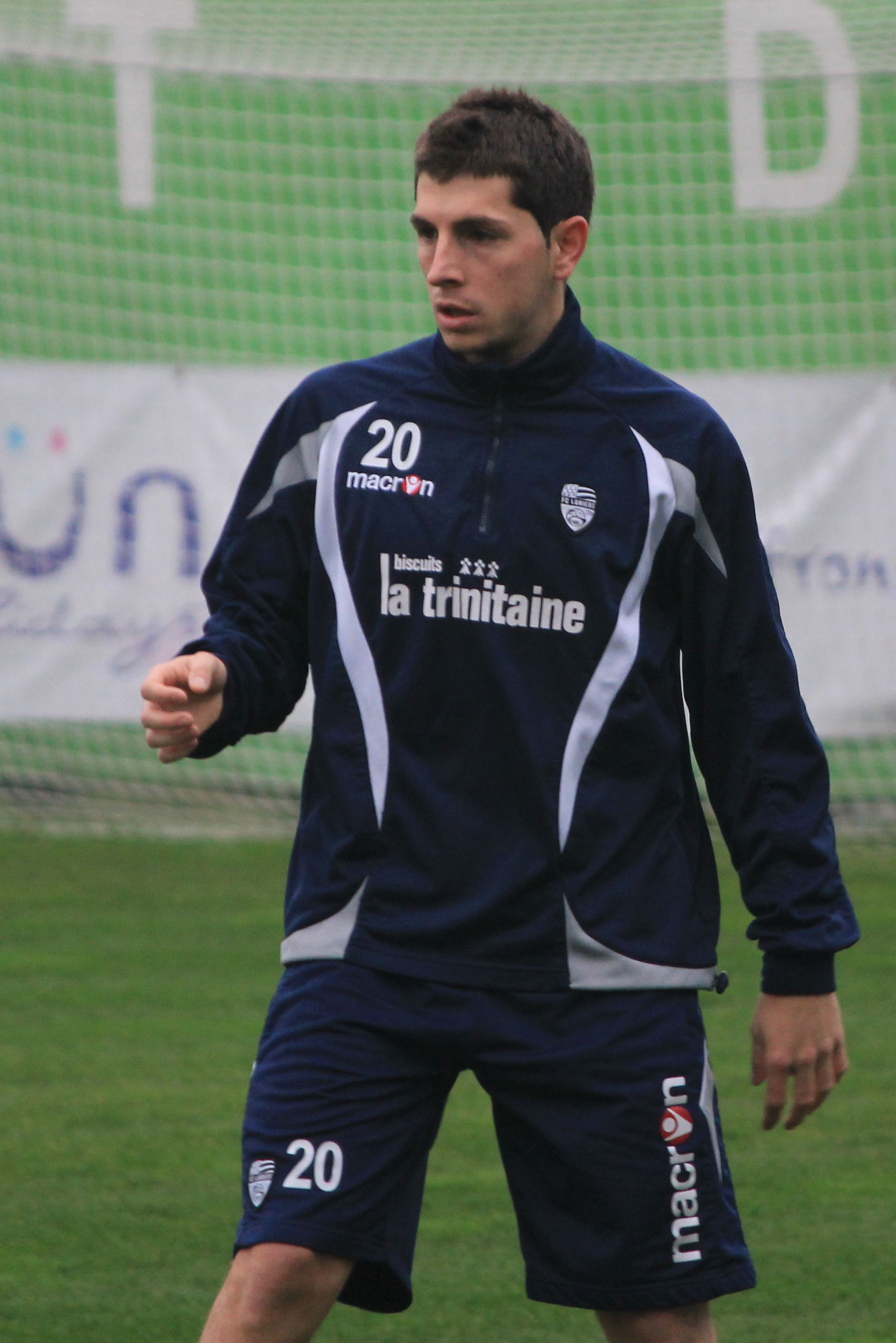 Julien Quercia pendant un entrainement du FC Lorient le 3 janvier 2012